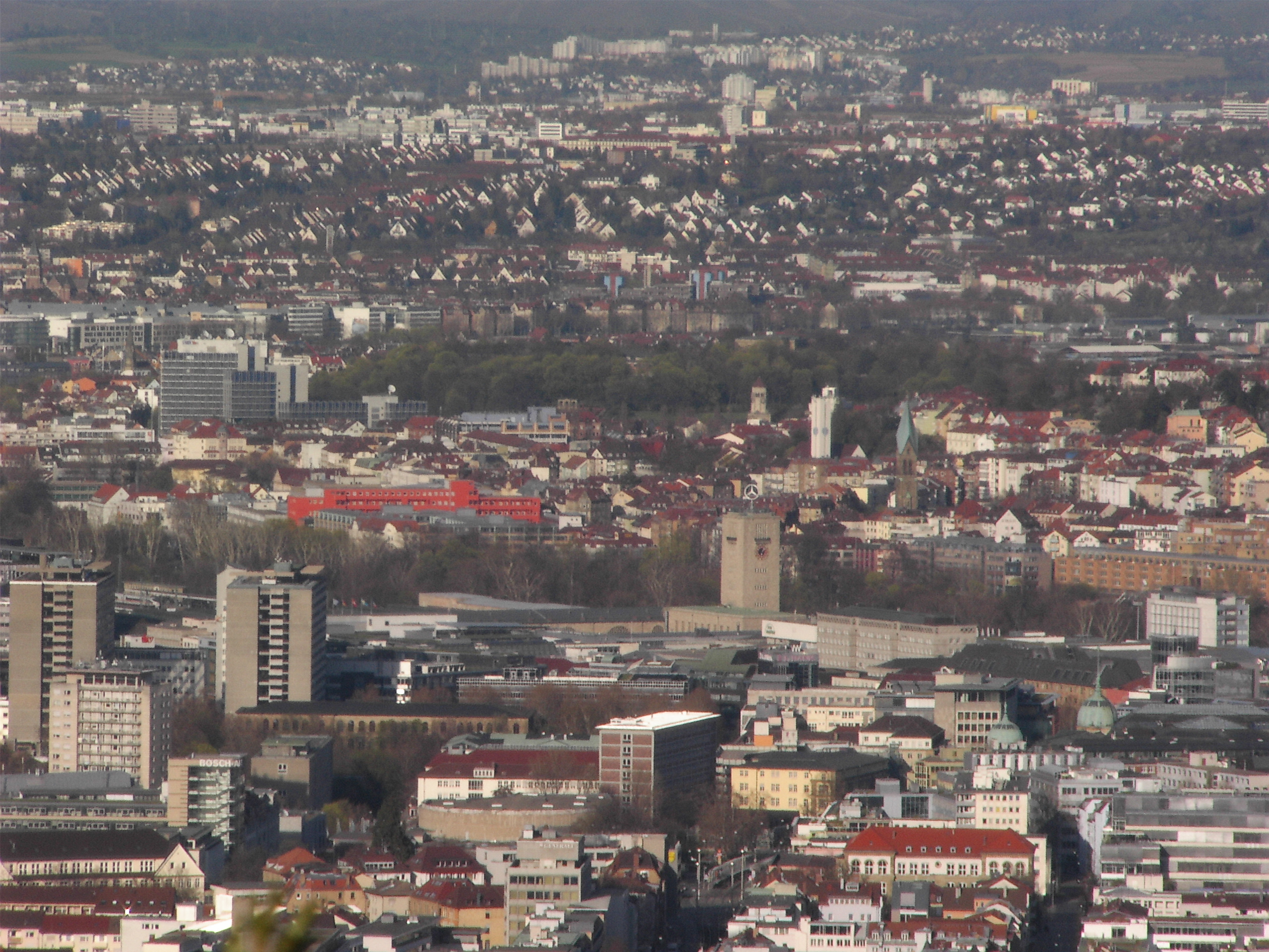 Blick auf die Gebäude K1 und K2 der Universität Stuttgart, den Südwestdeutschen Rundfunk (SWR), den Stuttgarter Hauptbahnhof und die Friedenskirche (Stuttgart-Ost)